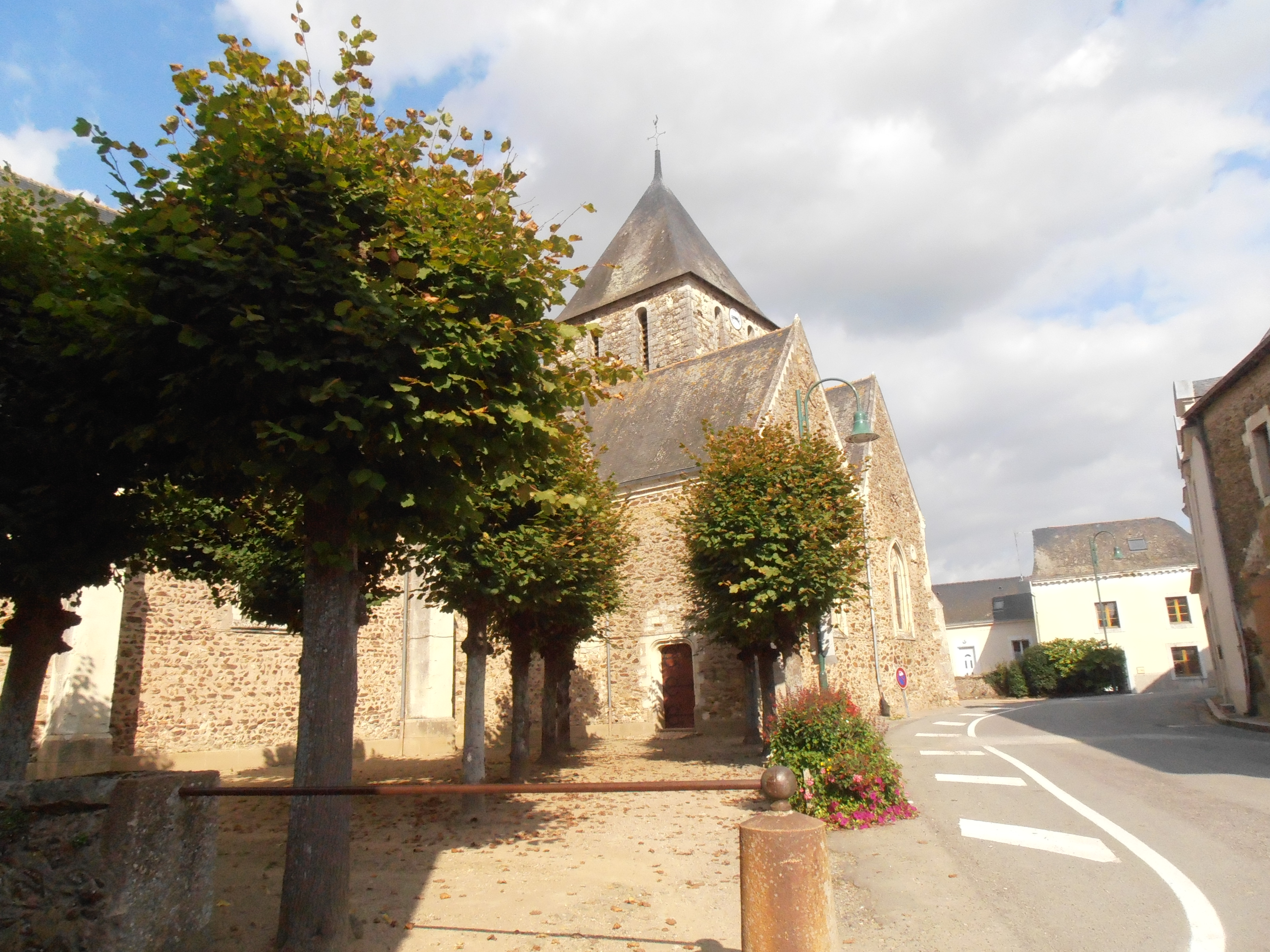 Centre de Miré